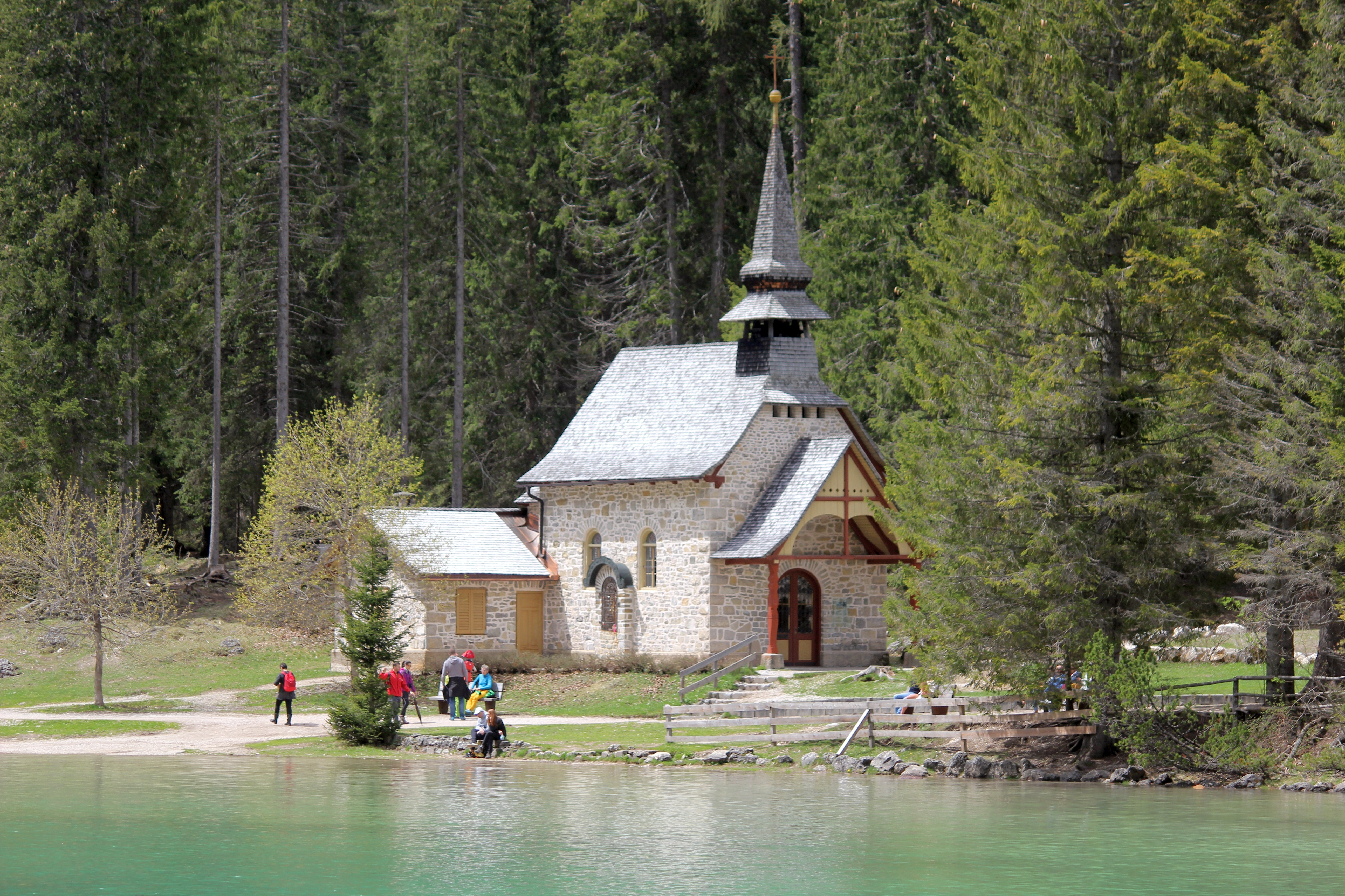 Marienkapelle am Pragser Wildsee